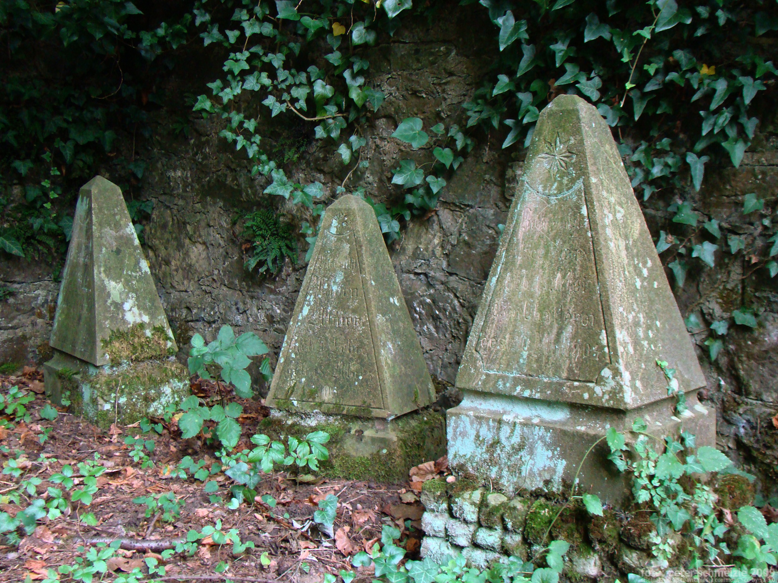 Kindergrabmale auf dem Judenfriedhof in Bad Wimpfen